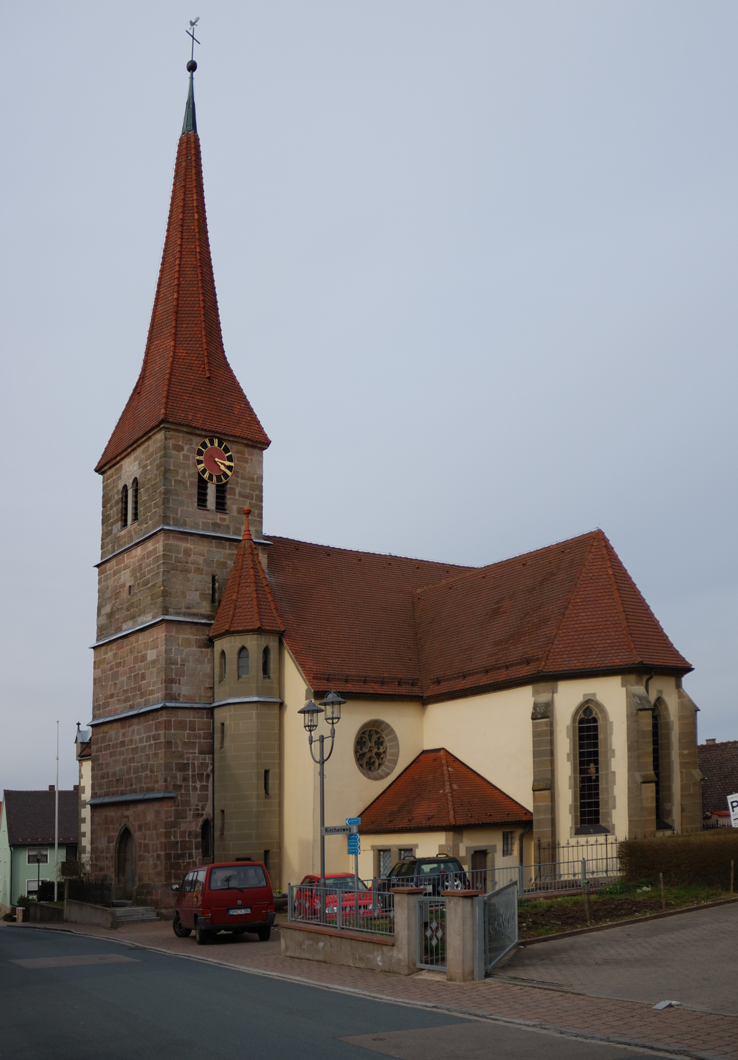 St. Nikolauskirche Mitteleschenbach